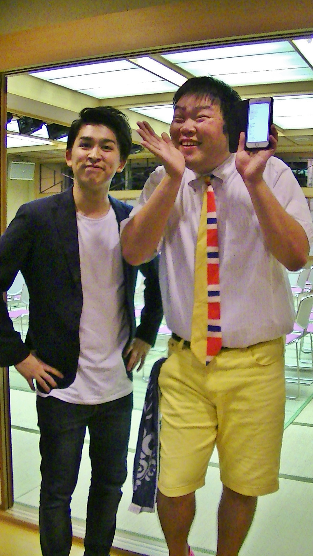 ジャガモンド (2017年9月)